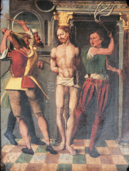 Antzaldatzearen elizako erretaularen xehetasuna, Akerreta